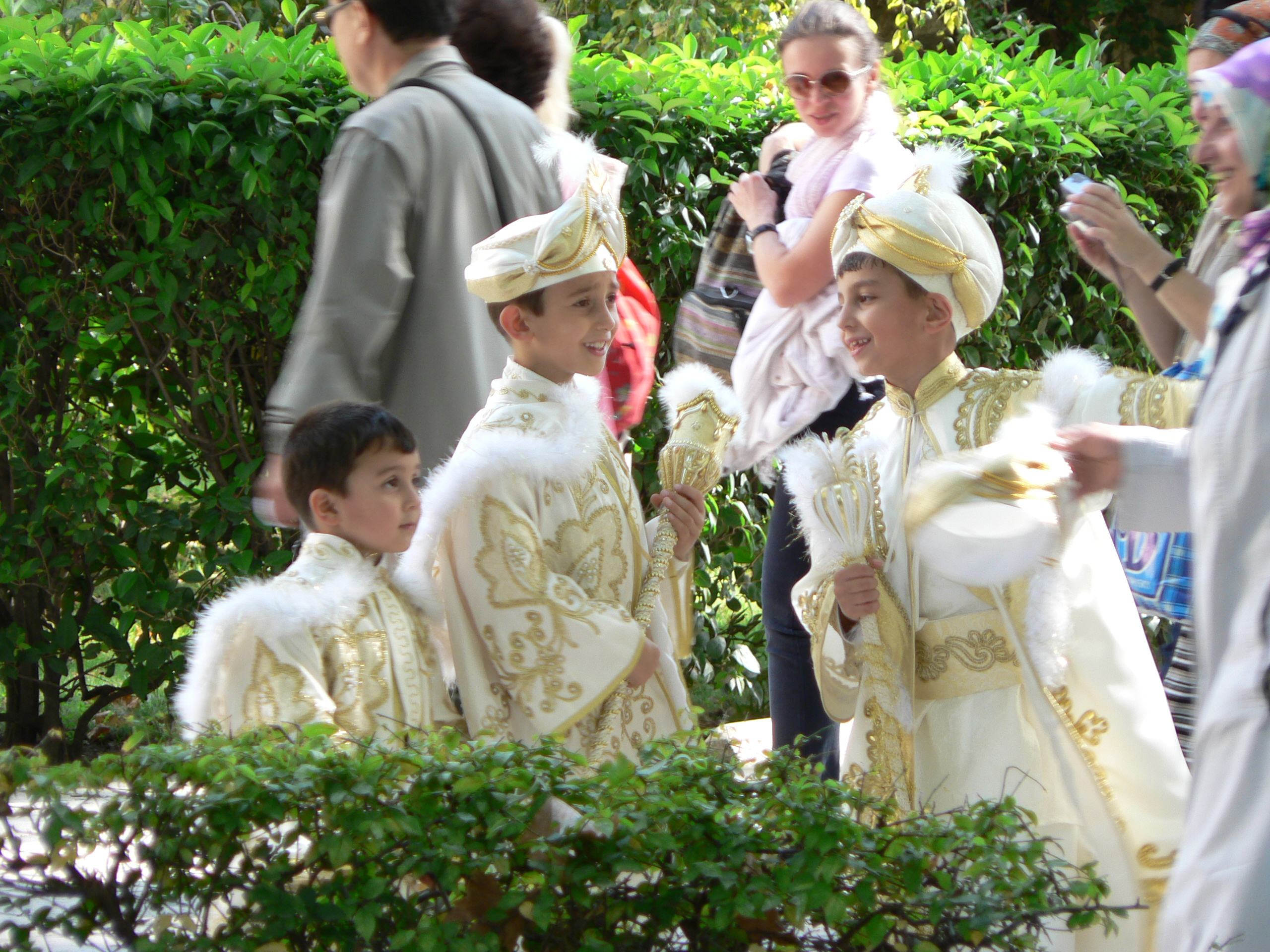 Topkapı palace, Istanbul.